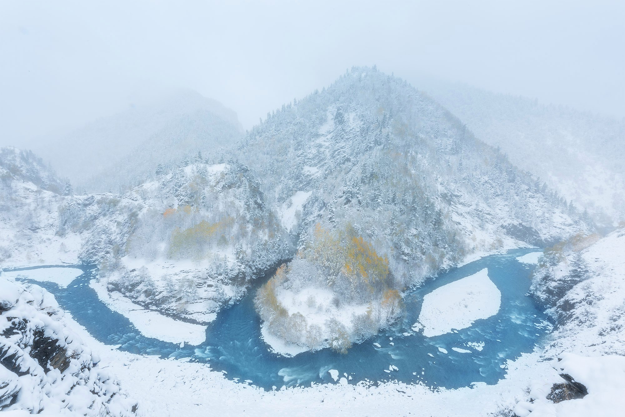 Winter in Dagestan. Tlyaratinsky district